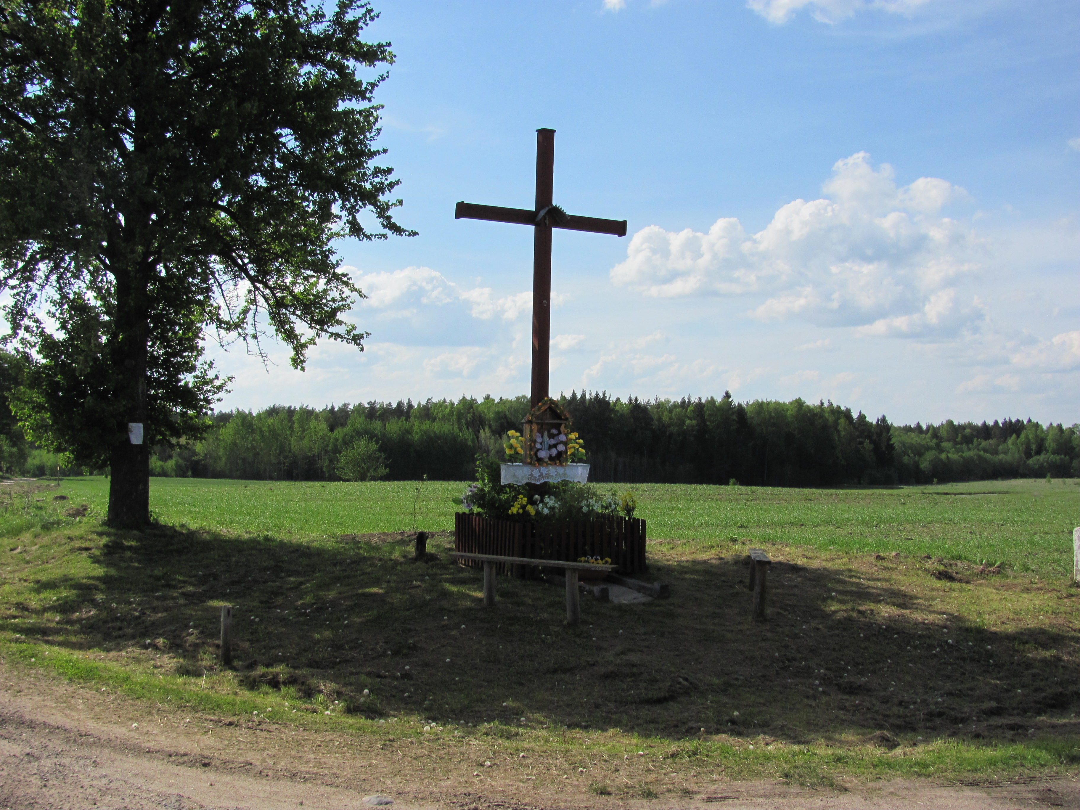 Vyžiškės, Lithuania